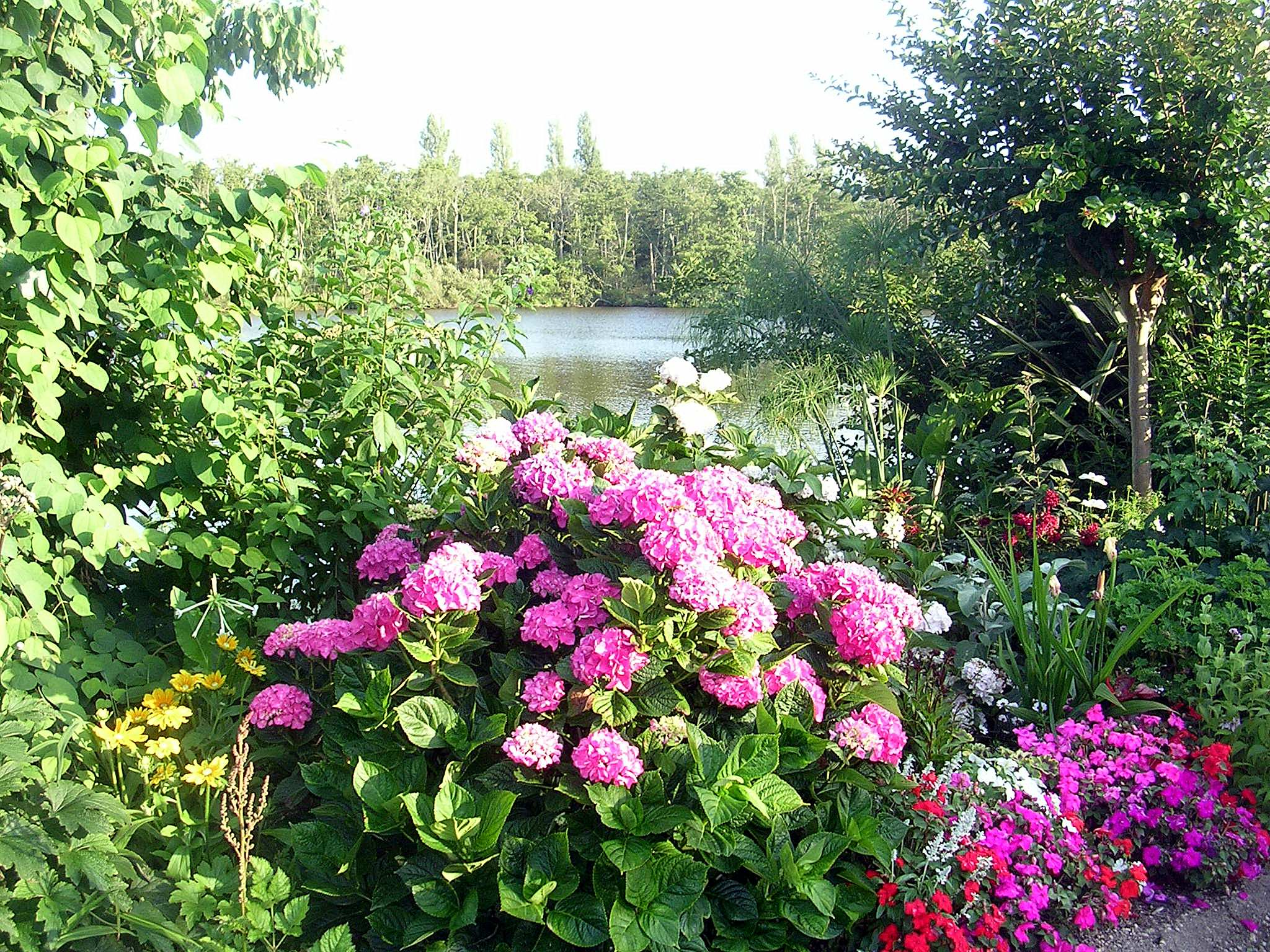 Promenade fleurie au lac d'Aureilhan de Mimizan, dans le département français des Landes